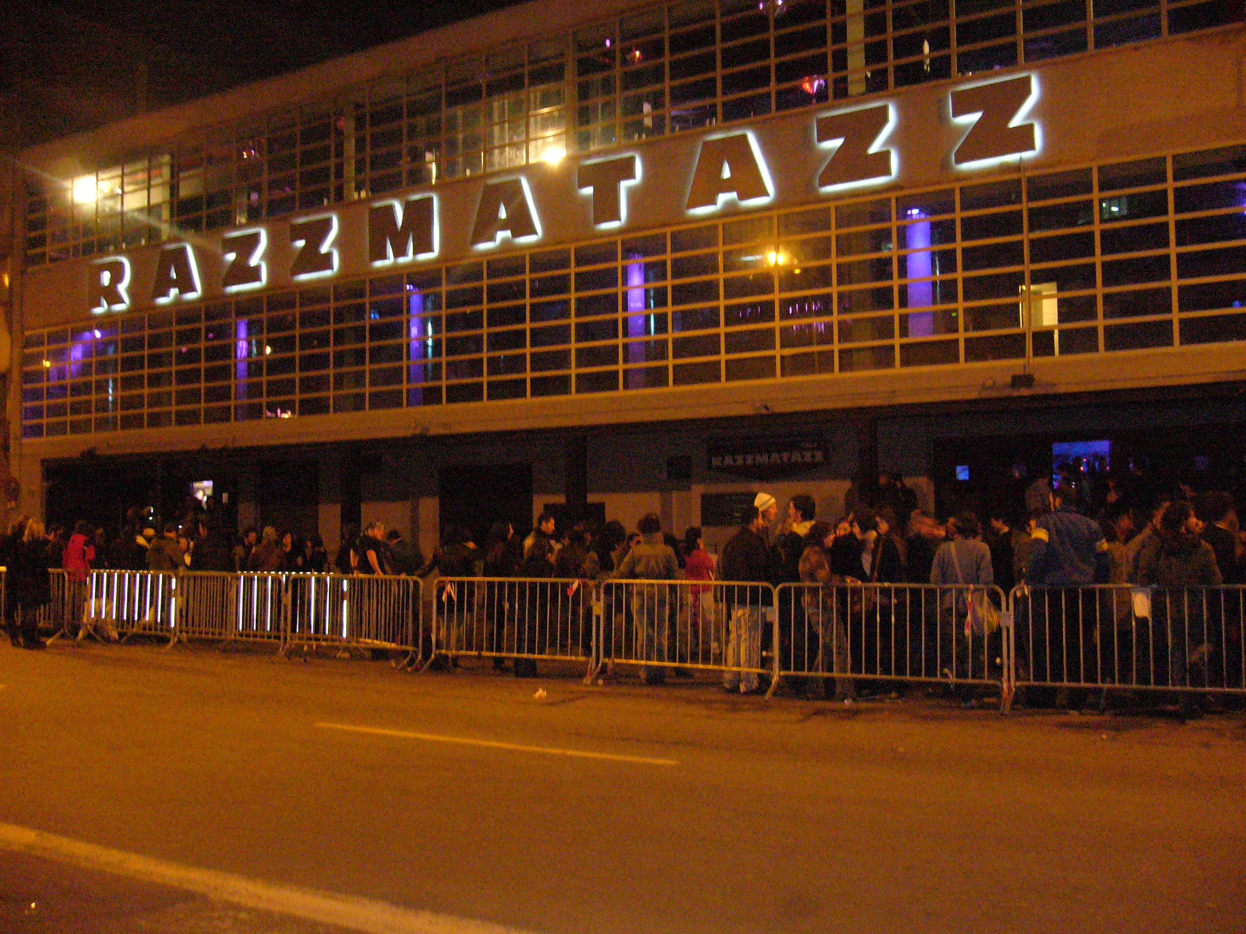 Salida de Razzmatazz. Razzmatazz, escenario del concierto de Barcelona, España.